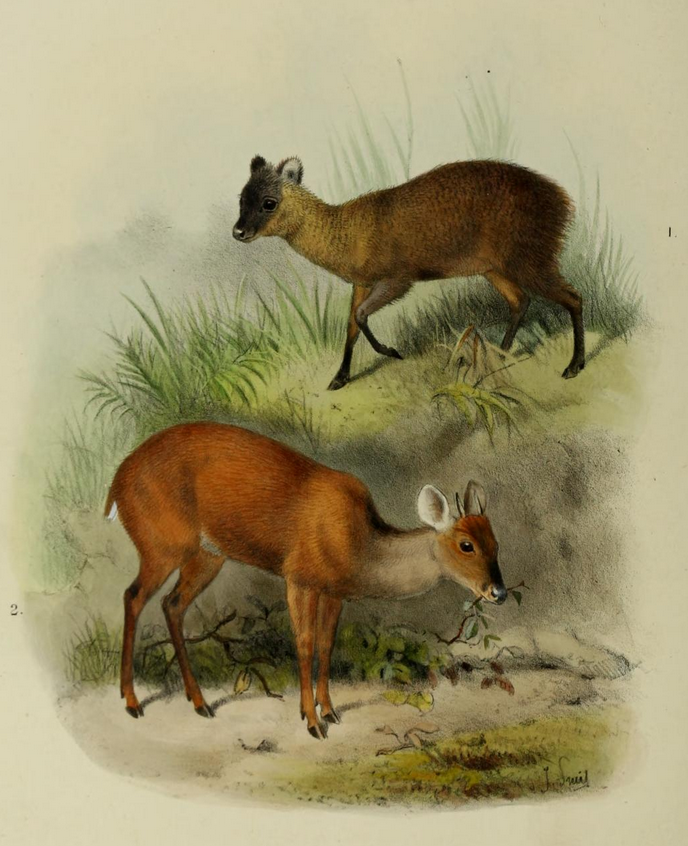 Ecuador pudu & Central American brocket